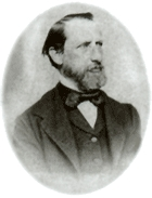 Henry Nestlé, 1800s.